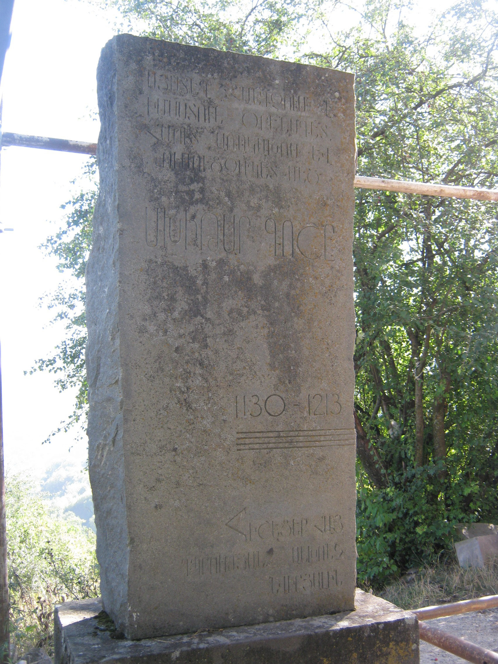 Մխիթար գոշի գերեզմանաքար 23/2.15